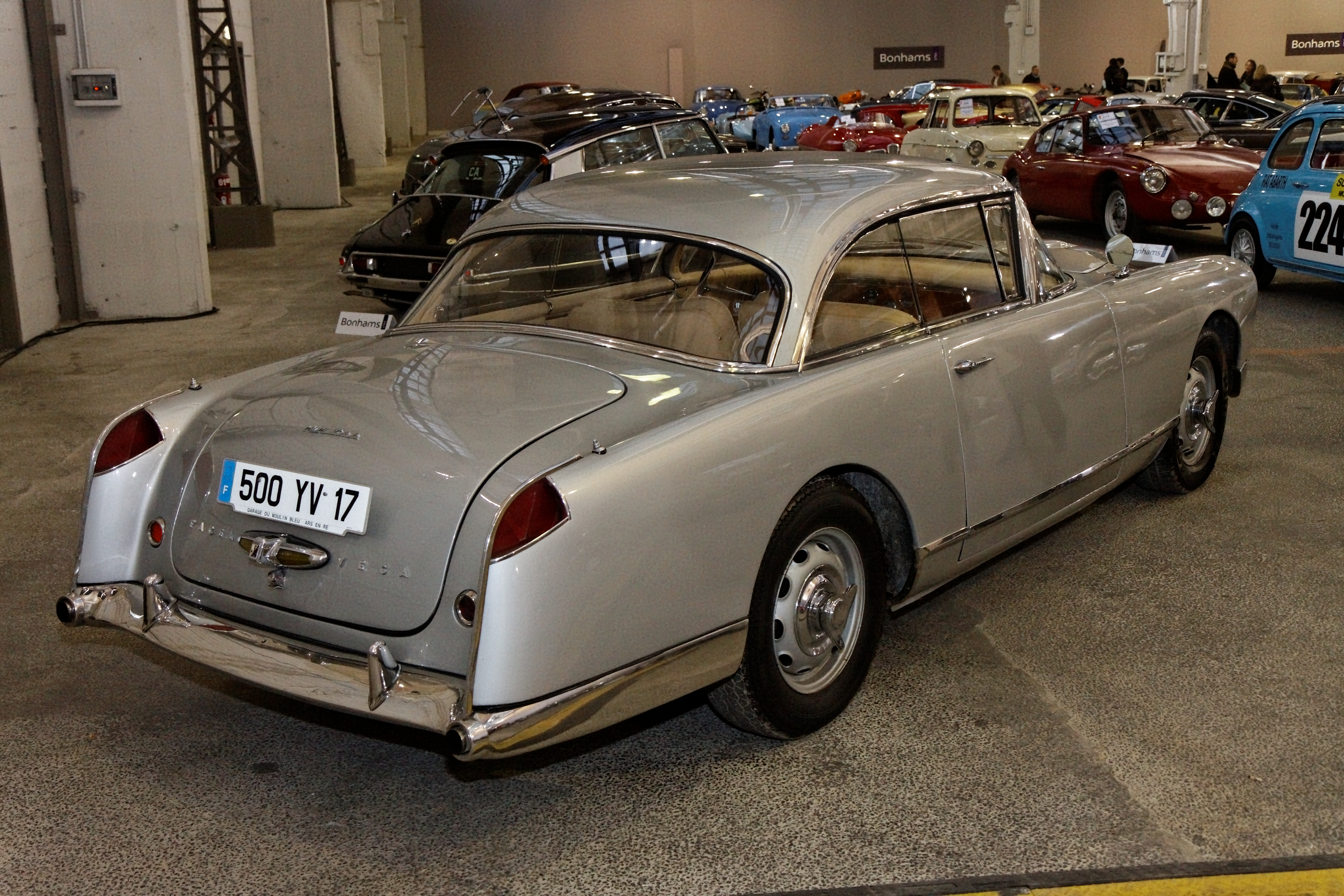 Facel Vega HK500 Coupé